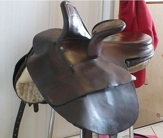 selle d'amazone anglaise champion and wilton fourches larges dites de chasse